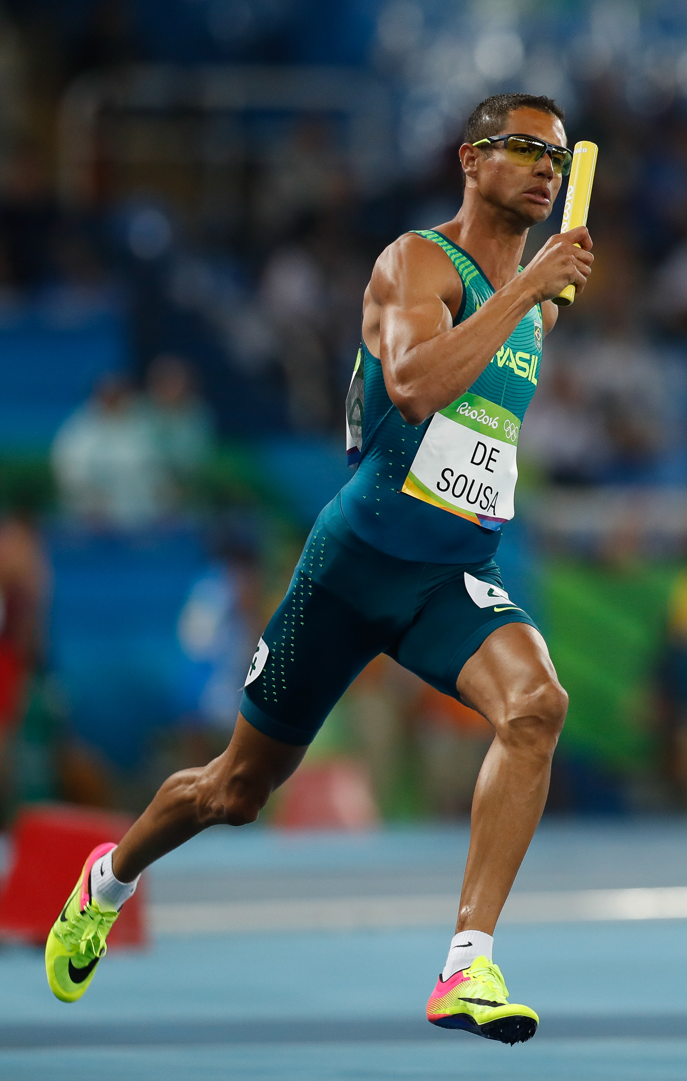 Rio de Janeiro - Eliminatórias do revezamento 4 x 400m nos Jogos Rio 2016, no Estádio Olímpico (Fernando Frazão/Agência Brasil)